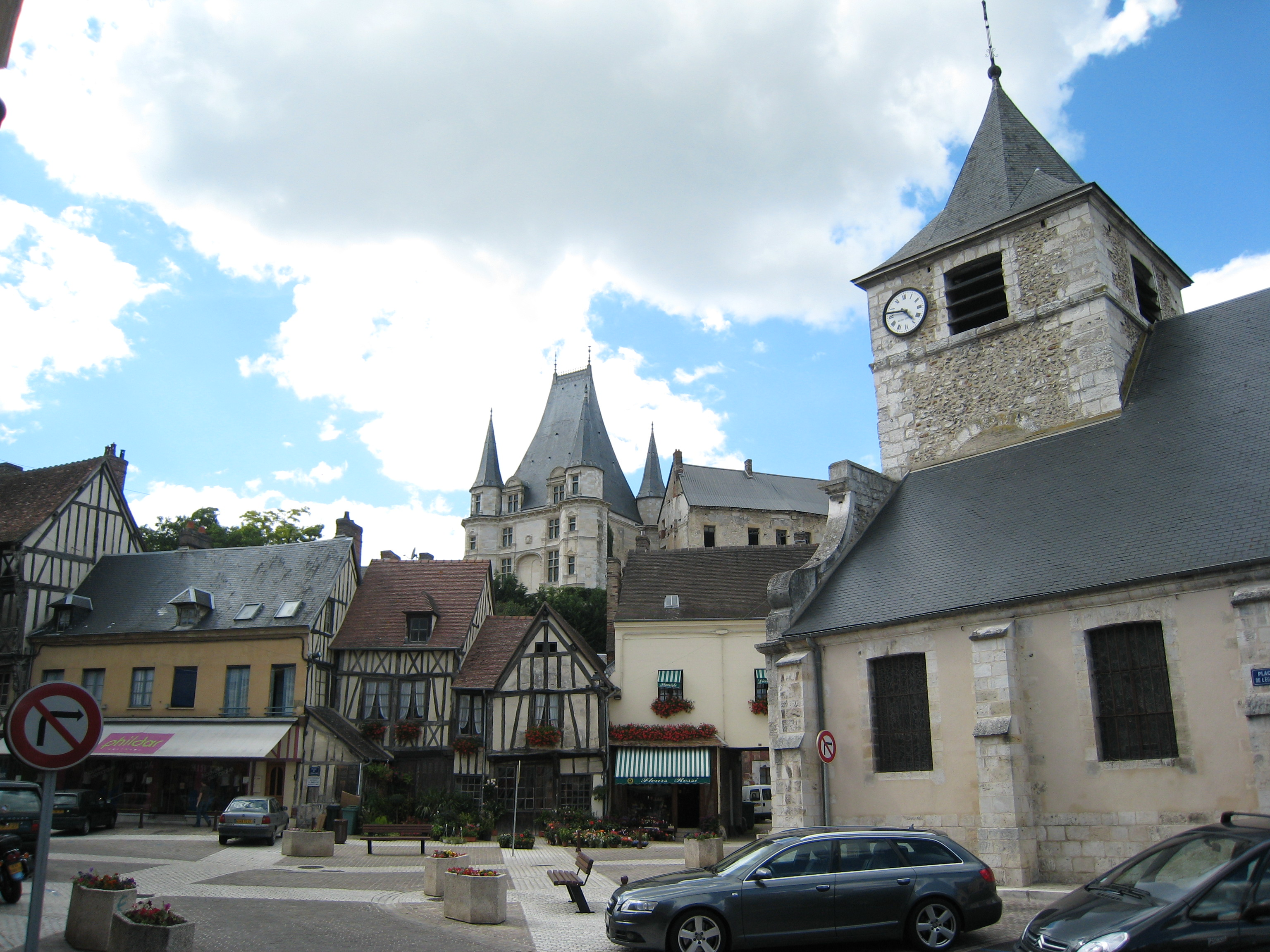 Place de l'église, à Gaillon, 27, Eure, France.